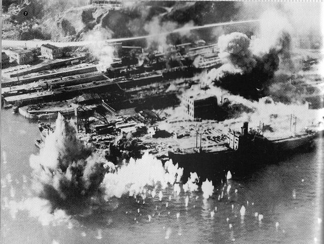 Taikoo dockyard under US air raid